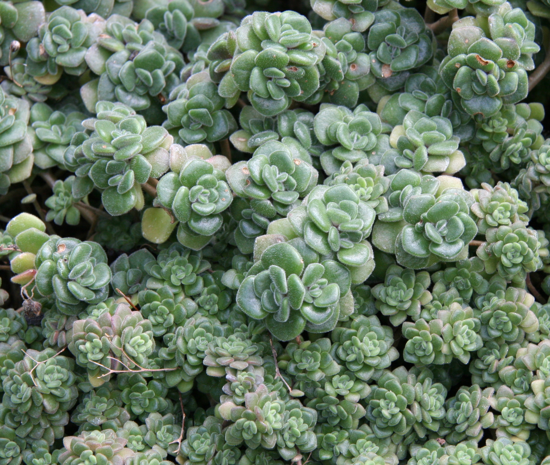 Aichryson tortuosum im Botanischen Garten Erlangen